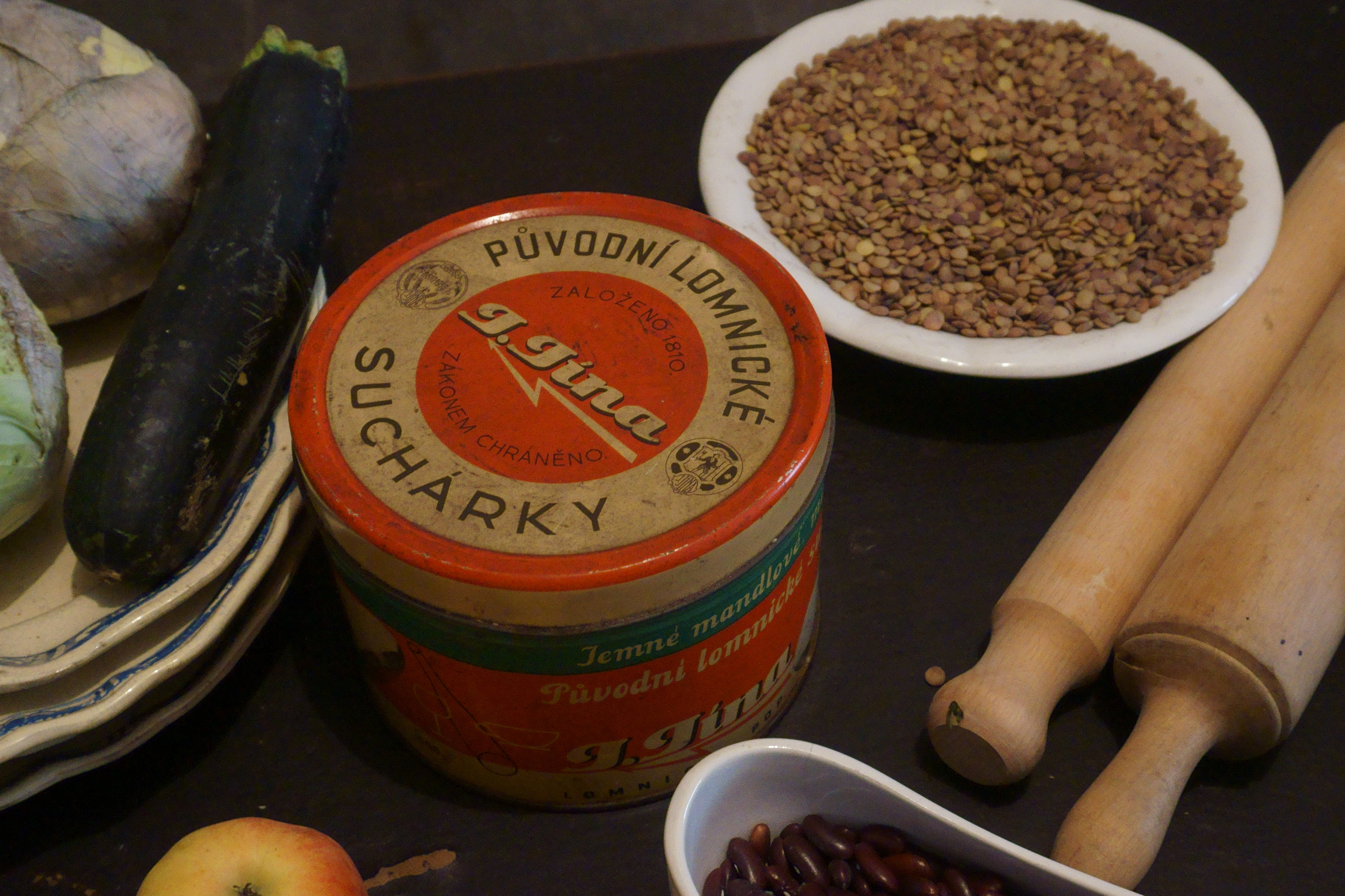 Plechová krabice na lomnické scuhary, instalace na státním zámku Hrubý Rohozec.